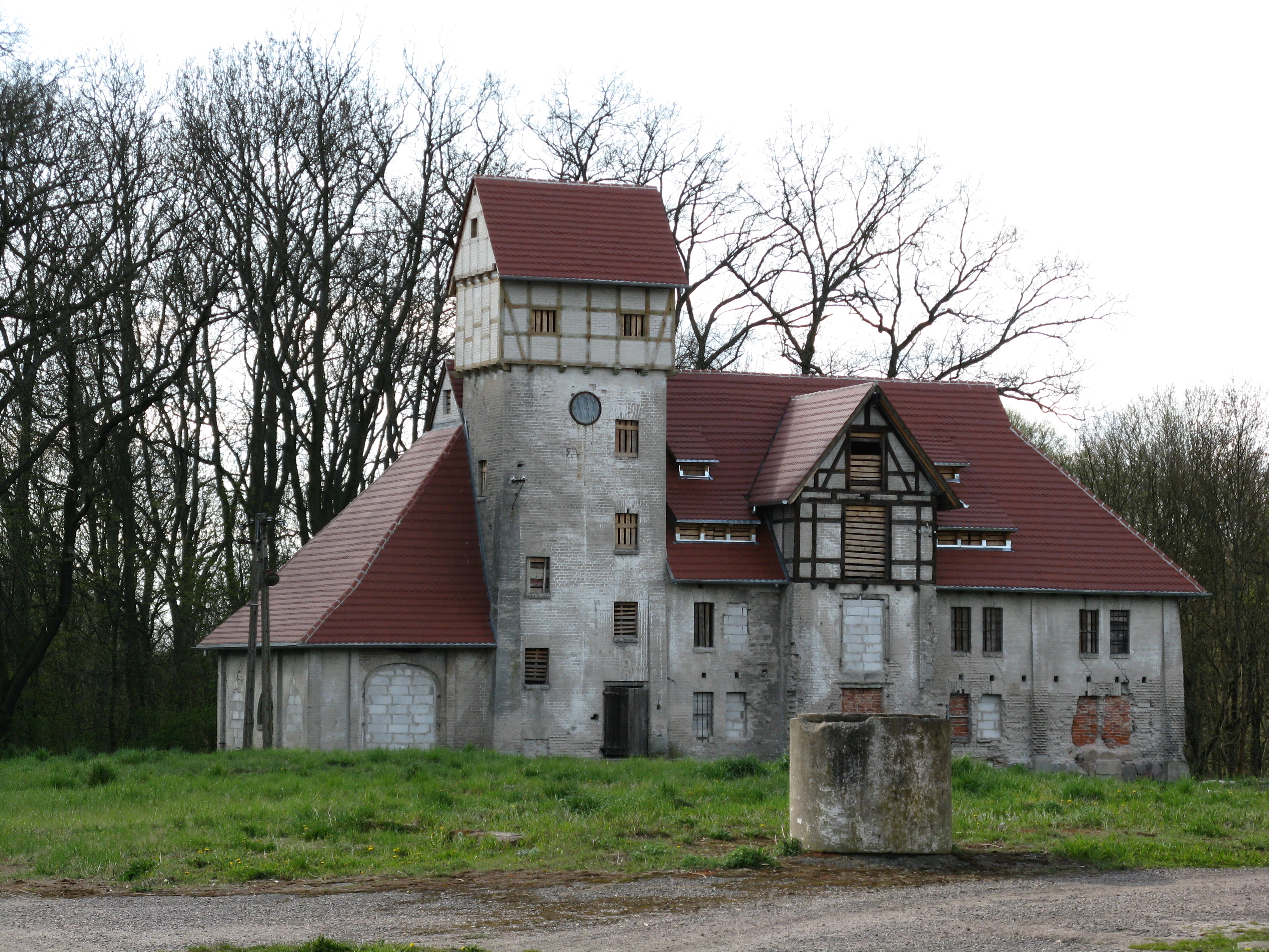 Jankowo - spichlerz, pocz. XX